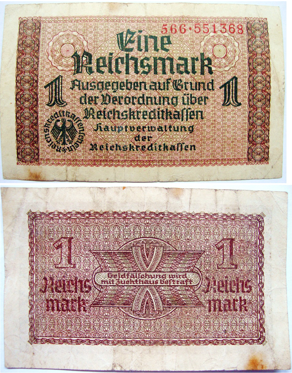 1 Reichsmark 1938-1945, Germany